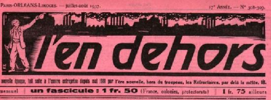 L'En-dehors parait en 1922 sous la direction d'E. Armand (nom de plume d'Ernest Juin).